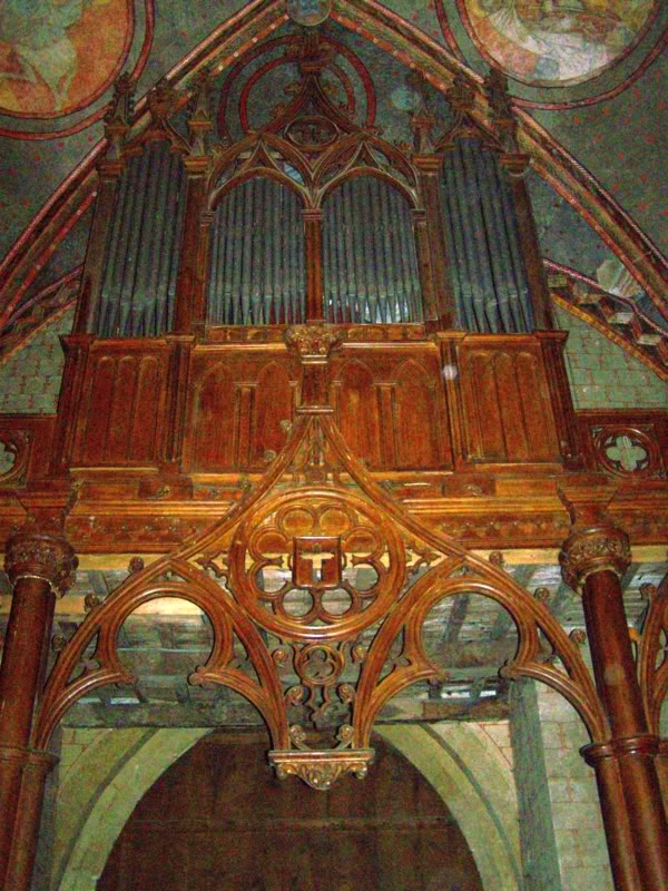 Église Sainte-Marie de Boulogne-sur-Gesse